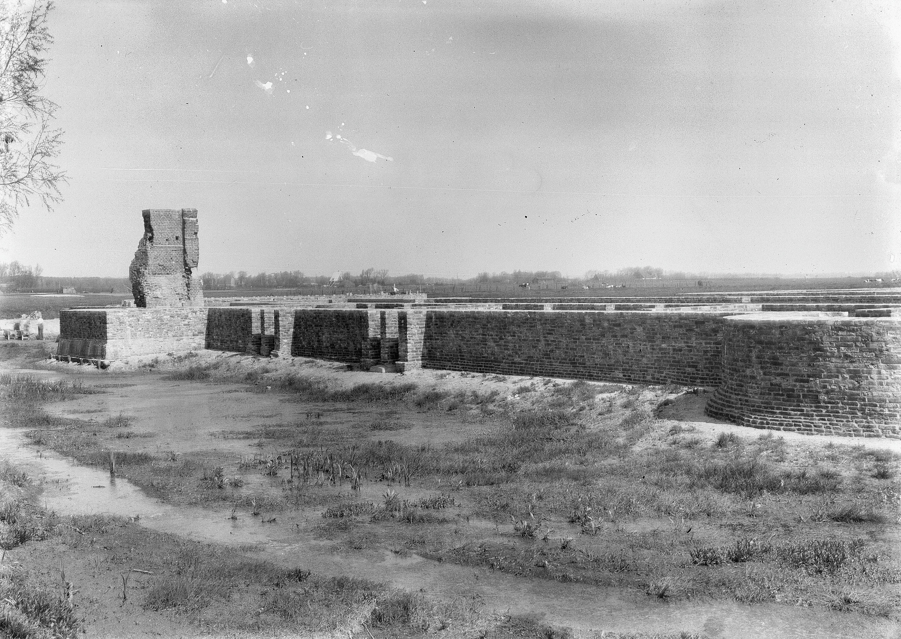 Kasteel: ruïne